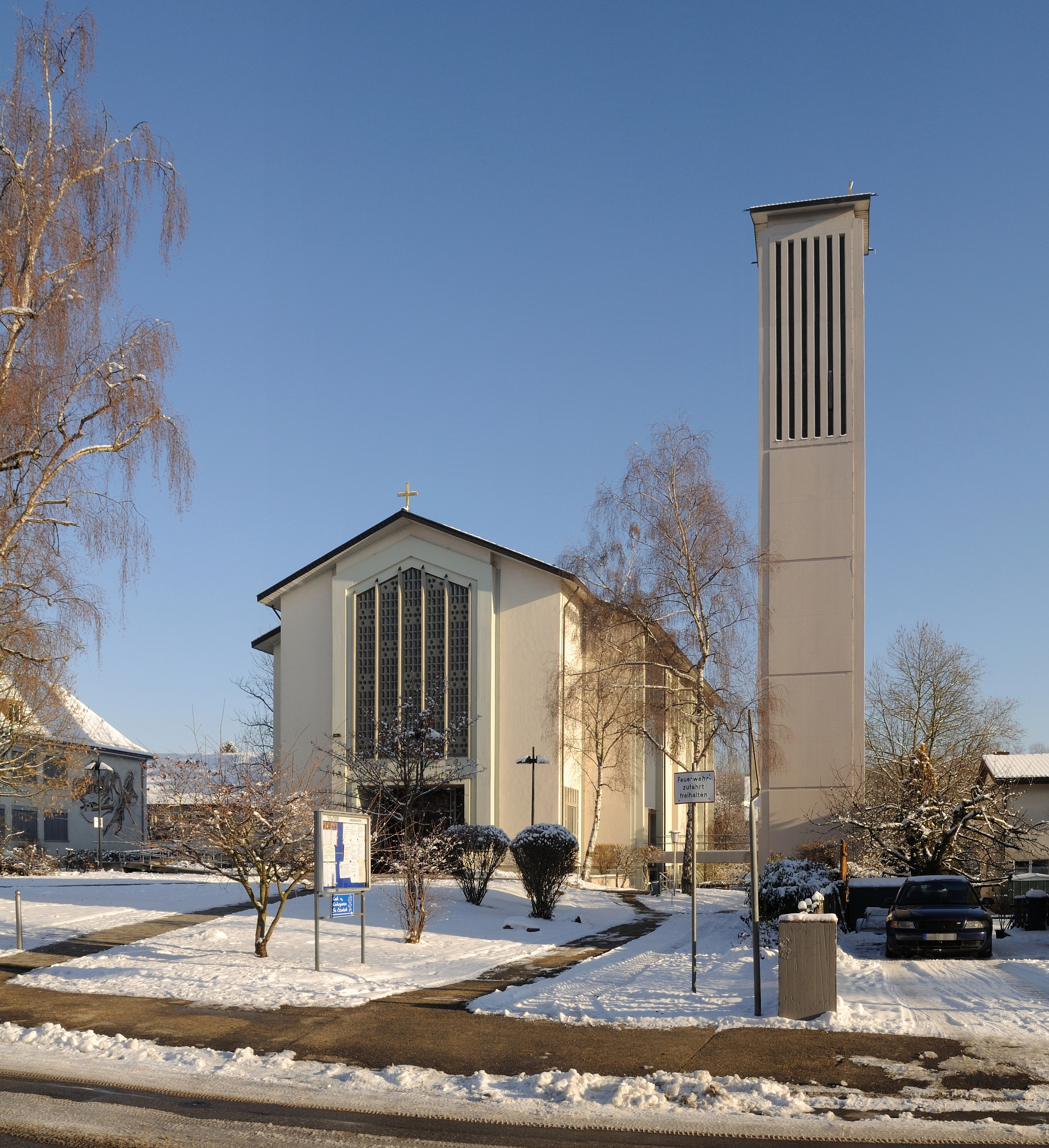 Weil am Rhein: Pfarrkirche Guter Hirte